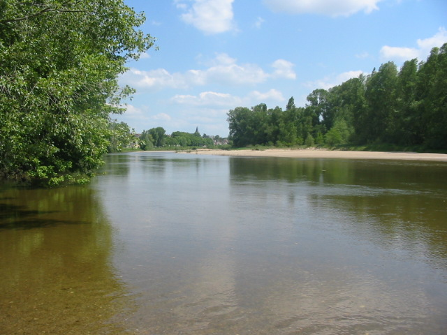 Les sentiers du milieu de Loire, à Pouilly-sur-Loire